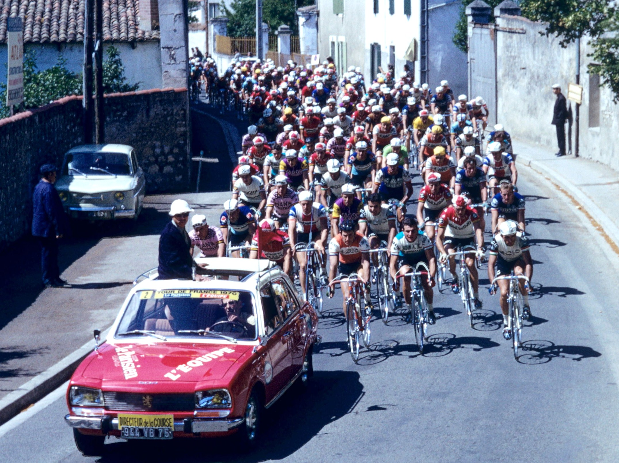 Tour de France cycliste 1970, seconde étape La Rochelle-Angers. Juste après le départ, les coureurs cyclistes passent rue Marius Lacroix en face du n° 51. Au premier plan on aperçoit la moto du journal télévisé qui est suivie par la voiture du Directeur du Tour précédant les coureurs. Dans le peloton on distingue un cycliste en maillot jaune, c' est Eddy Merckx (vainqueur de la première étape Limoges-La Rochelle). Cette photographie a été prise depuis l' étage du 51 bis. Image recadrée. La Rochelle, Charente Maritime, France.